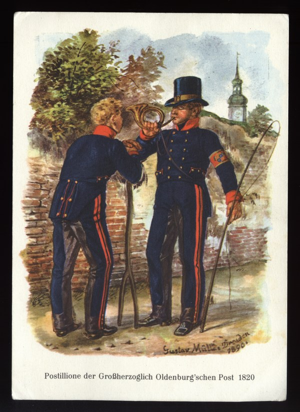 POCZTYLION uniform - 1820